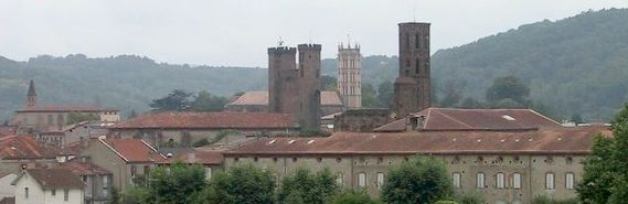 Vue générale de Pamiers (Ariège, Midi-Pyrénées, France) à partir du cimetière St-Jean.